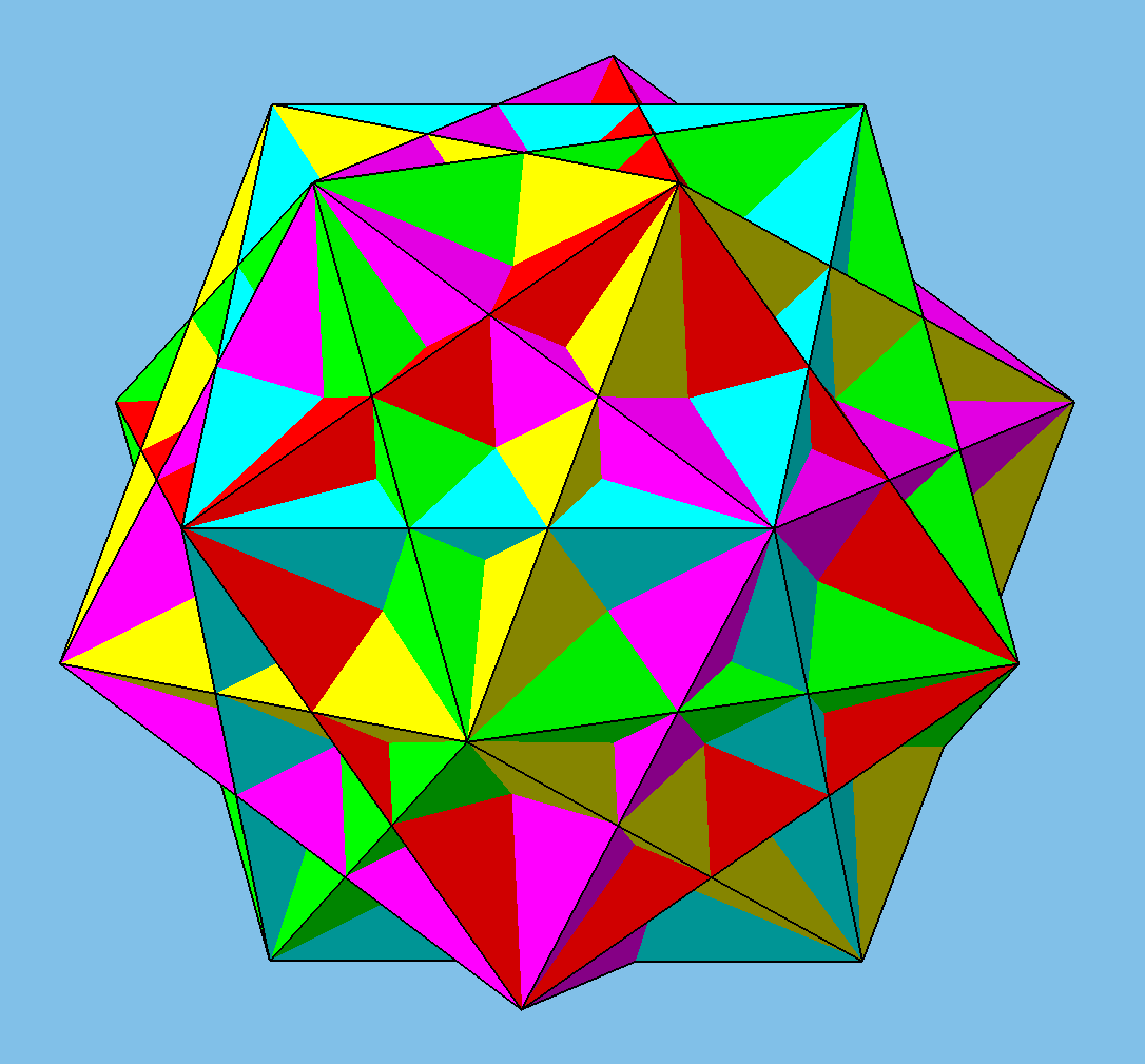 Durchdringung von fünf Würfeln, die im Dodekaeder zu finden sind.